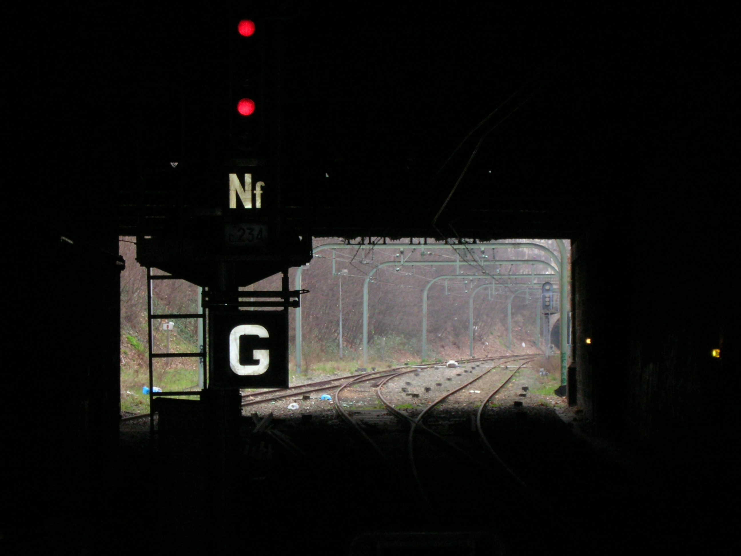 Station Pereire - Levallois, vue sur les voies vers Pt Cardinet, Paris 17e, France